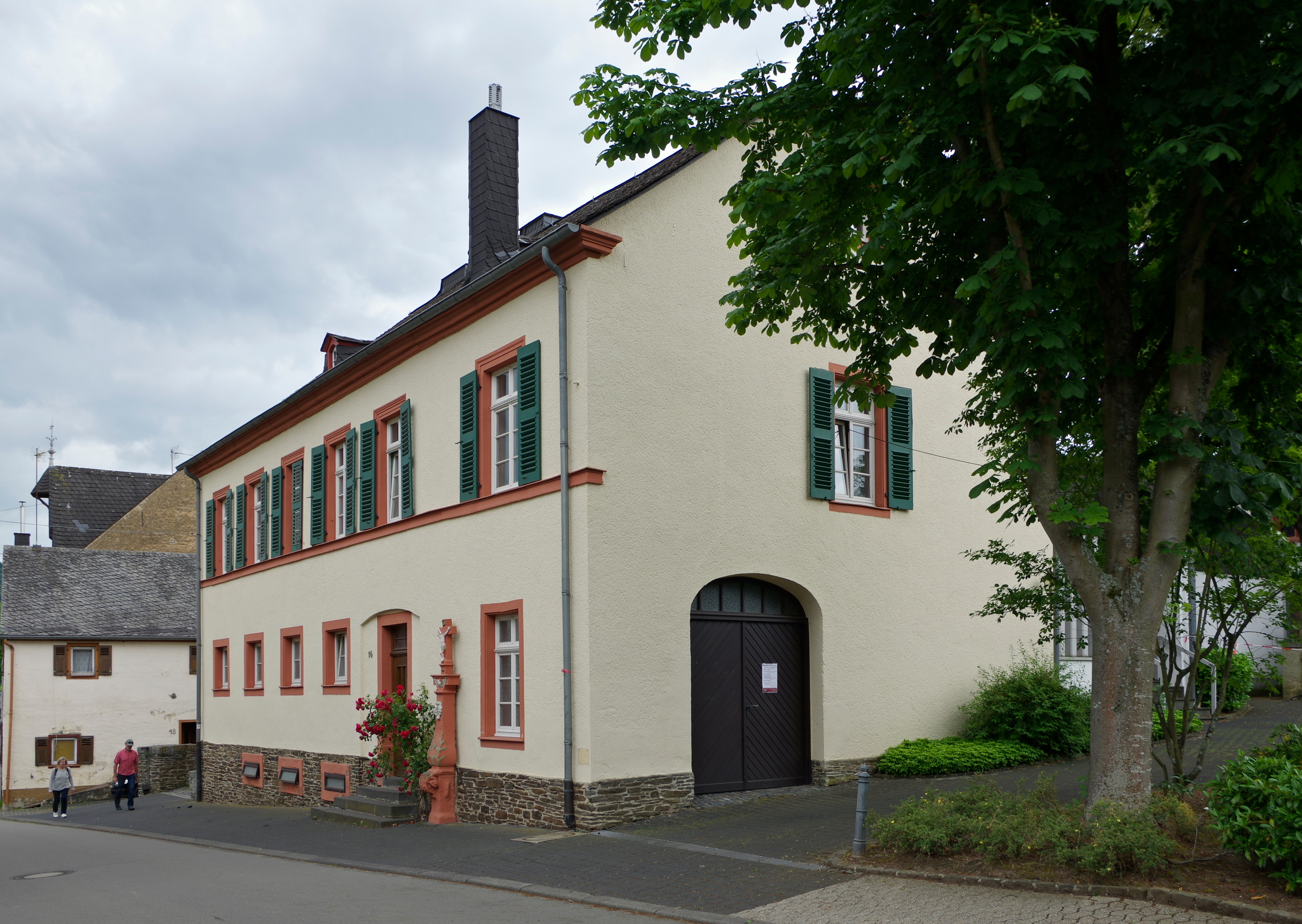 Lösnich, Hauptstr. 16